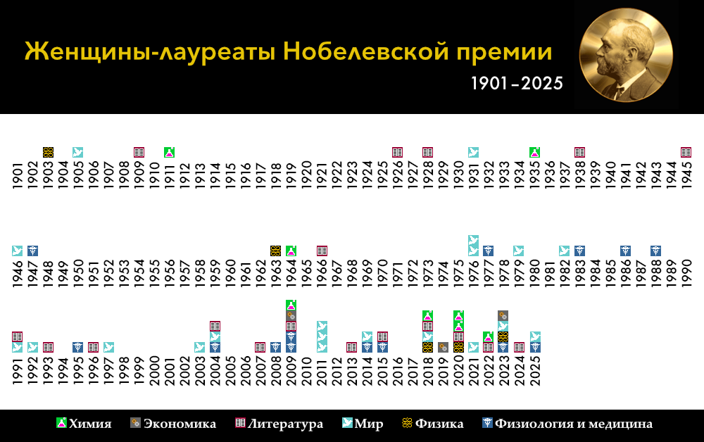 Диаграмма распределения женщин-лауреатов Нобелевской премии по годам